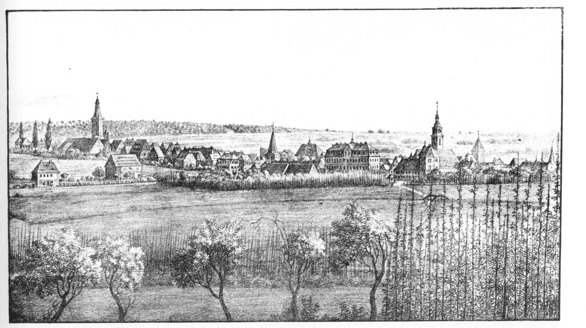 Neustadt an der Aisch in Mittelfranken/Bayern; Lithographie um 1830